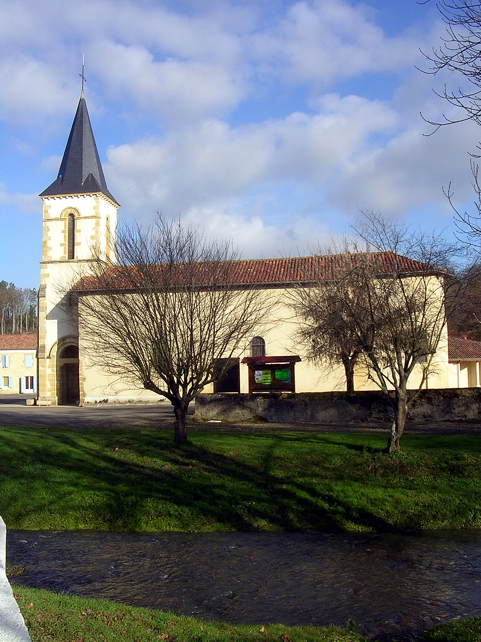 Eglise Saint-Jean-Baptiste de Bahus-Soubiran, dans le département français des Landes